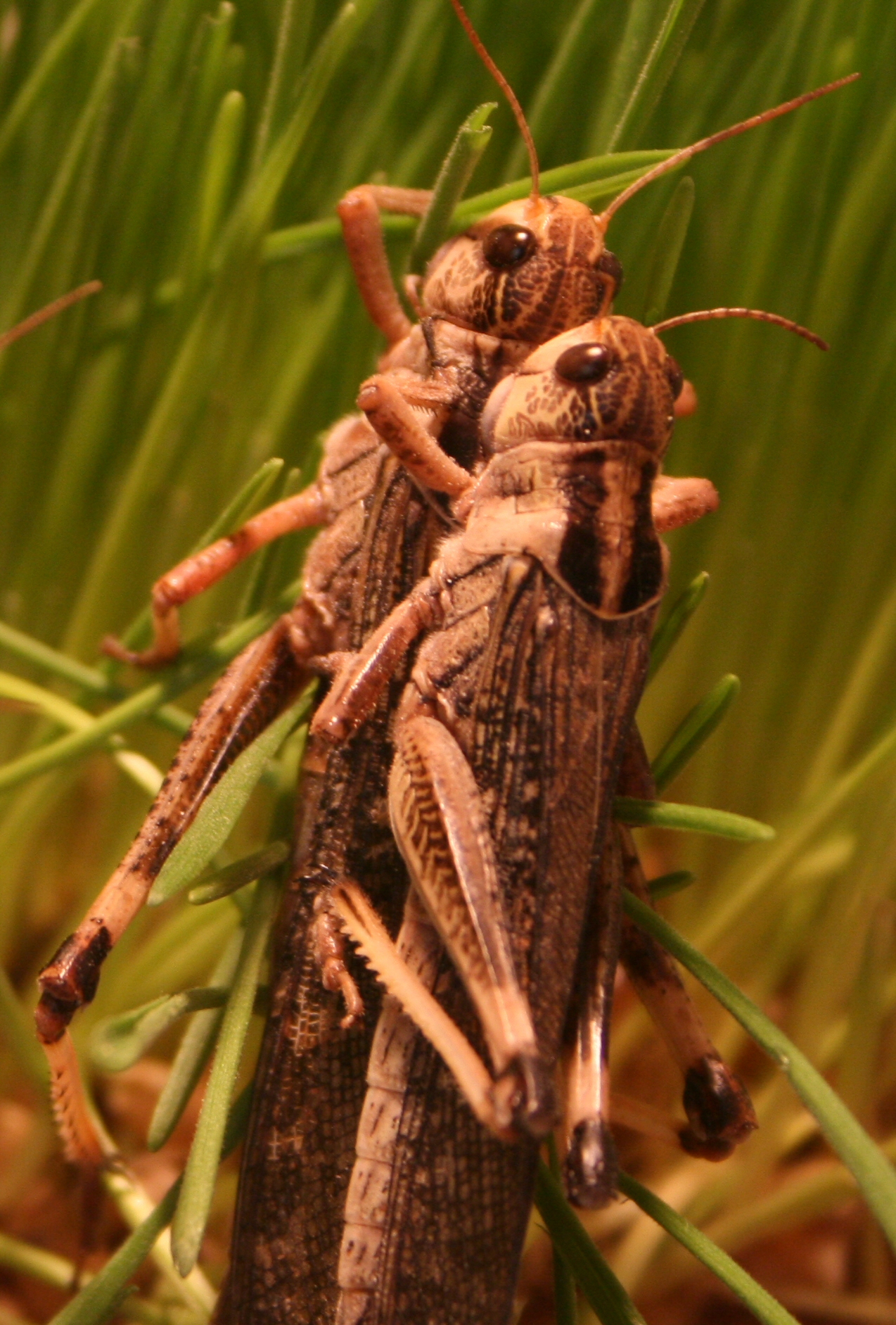 Wanderheuschrecke. (Locusta migratoria). Aufnahme: Zoo Basel.